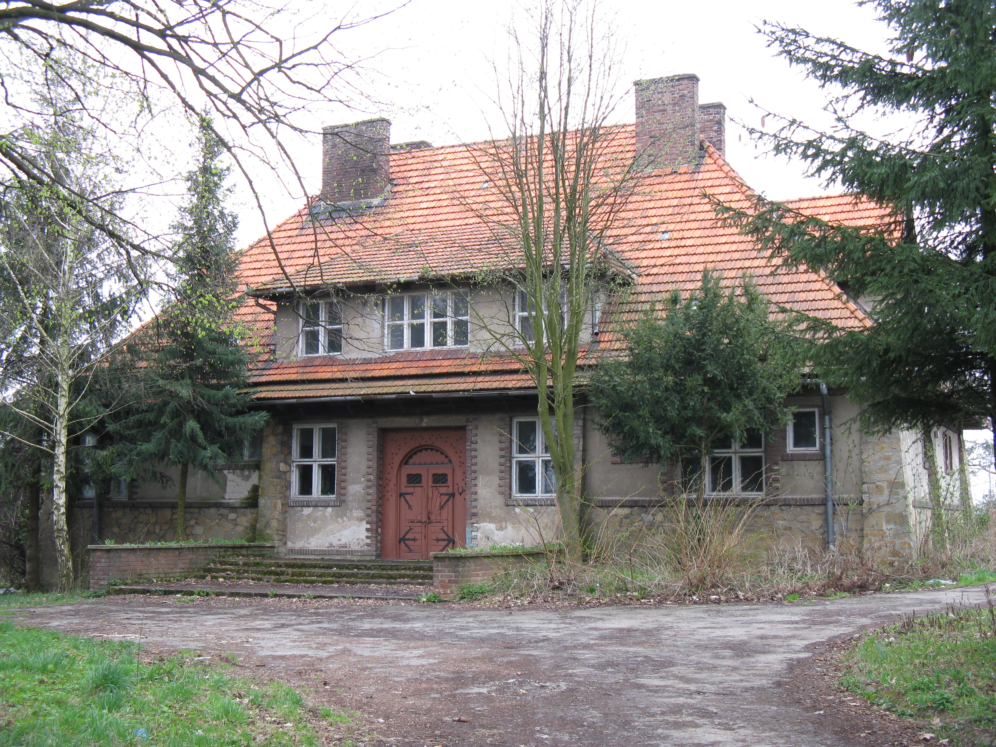 Uniwersytet Ludowy w Gaci (woj. podkarpackie). Powstały w latach 1935-36 jako Wiejski Uniwersytet Orkanowy w Gaci wg projektu arch. Jana Koszyc Witkiewicza. Kierowany przez Ignacego Solarza 10.1993.